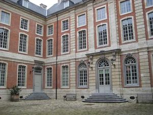 Archives de l'État à Leuven